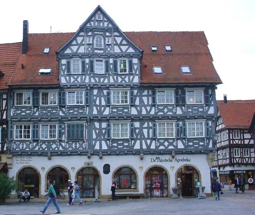 Palmsche Apotheke Foto: D. Andresen Linzenzstatus: GNU-FDL Aufnahme vom August 2003 mit freundlicher ´Genehmigung von Weberberg.de, Website für Biberach